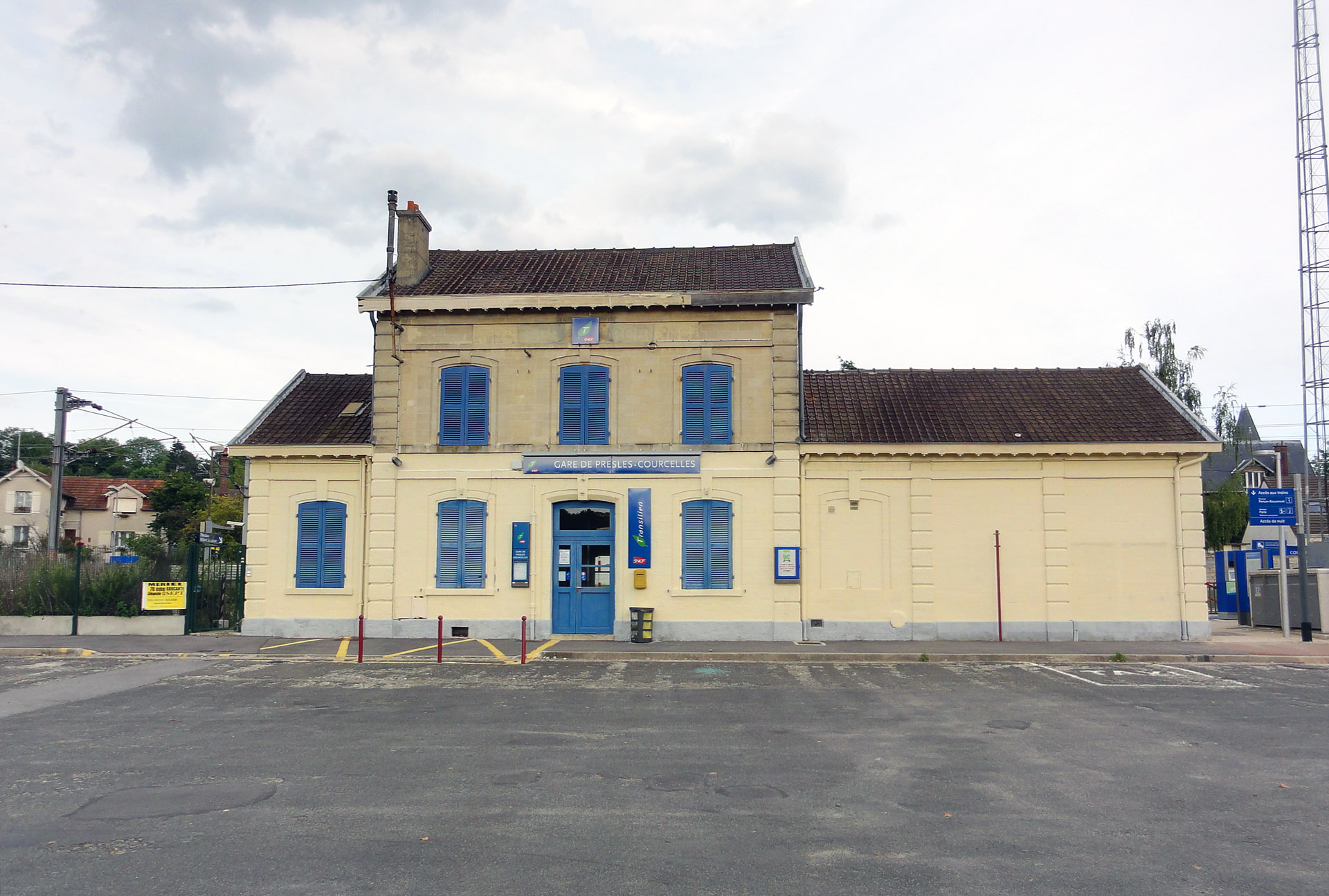 La gare de Presles - Courcelles, Val-d'Oise, France.